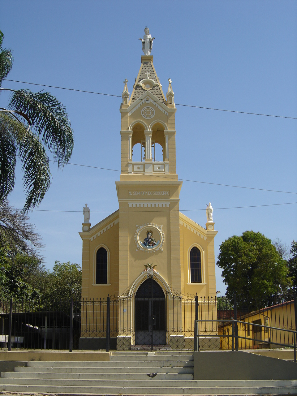 Igreja Nossa Senhora do Socorro/Pindamonhangaba